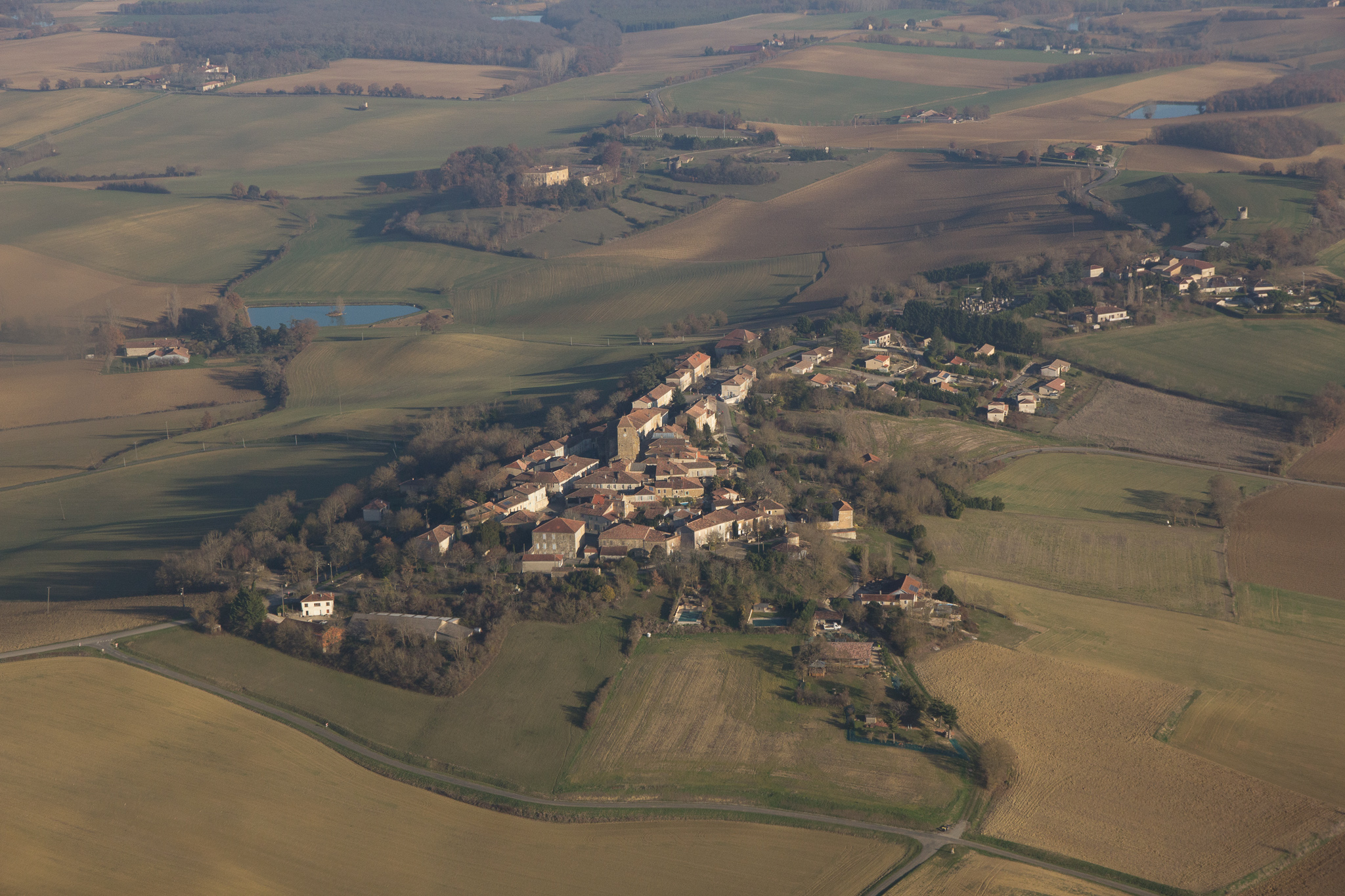 Vue Aérienne de la Sauvetat, prise le 21/12/2016